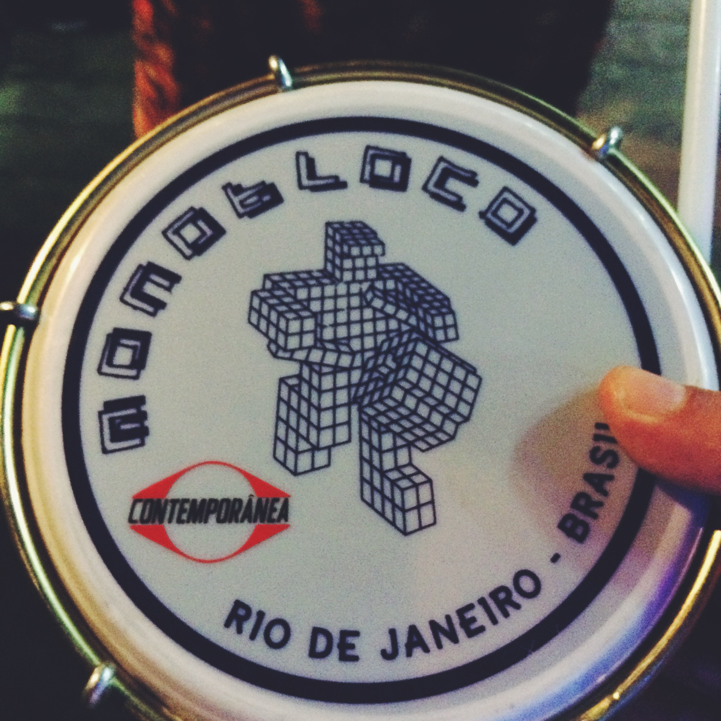 Ensayo Monobloco (Tamborino)